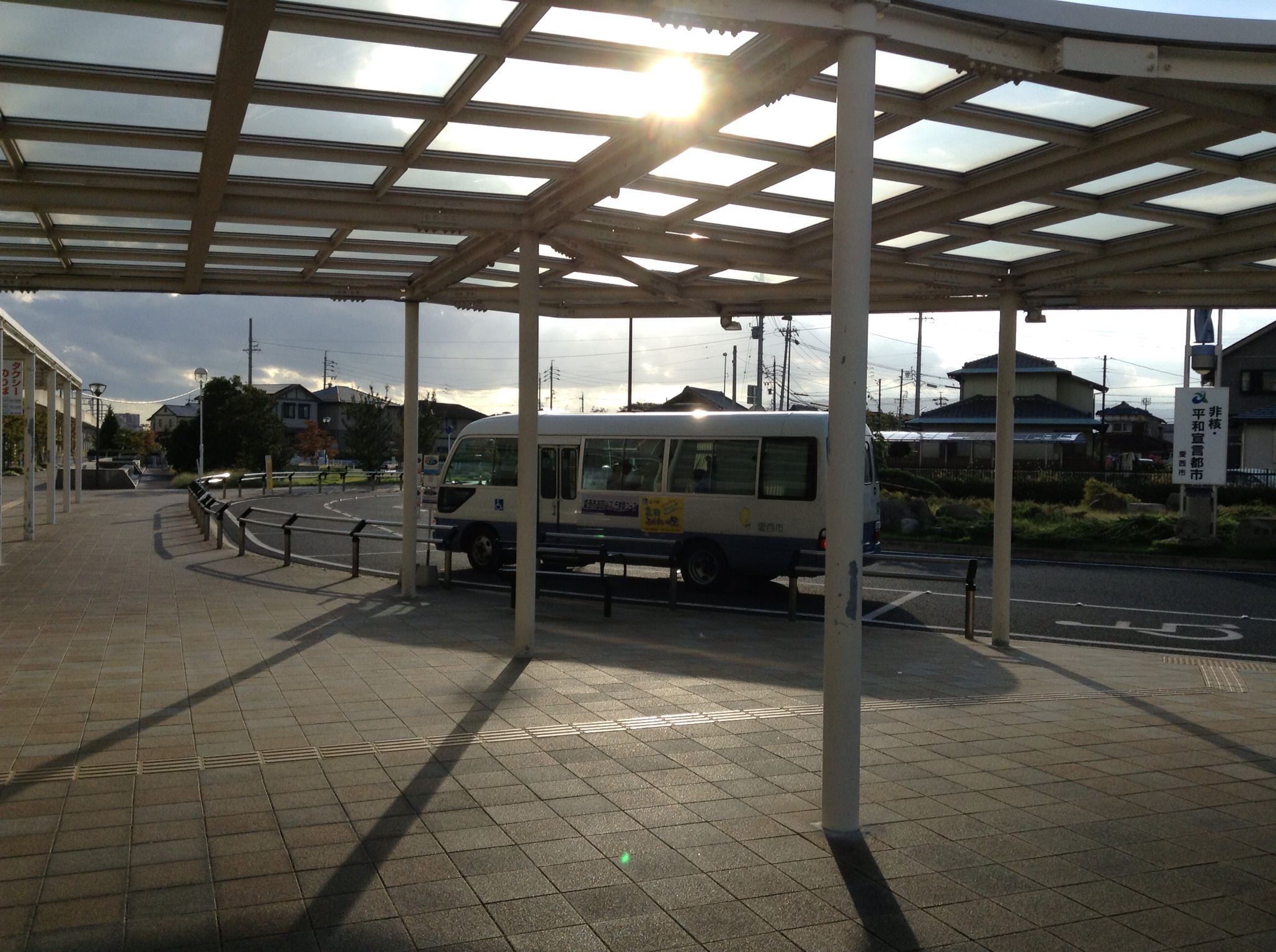 愛西市巡回バス庁舎間ルートのバス